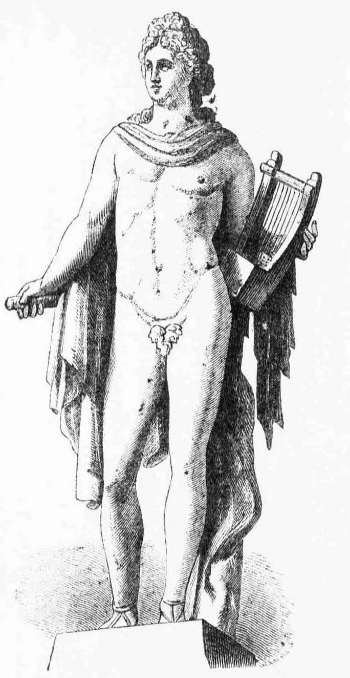 Apollo. Skulptur des griechischen Künstlers Drosis